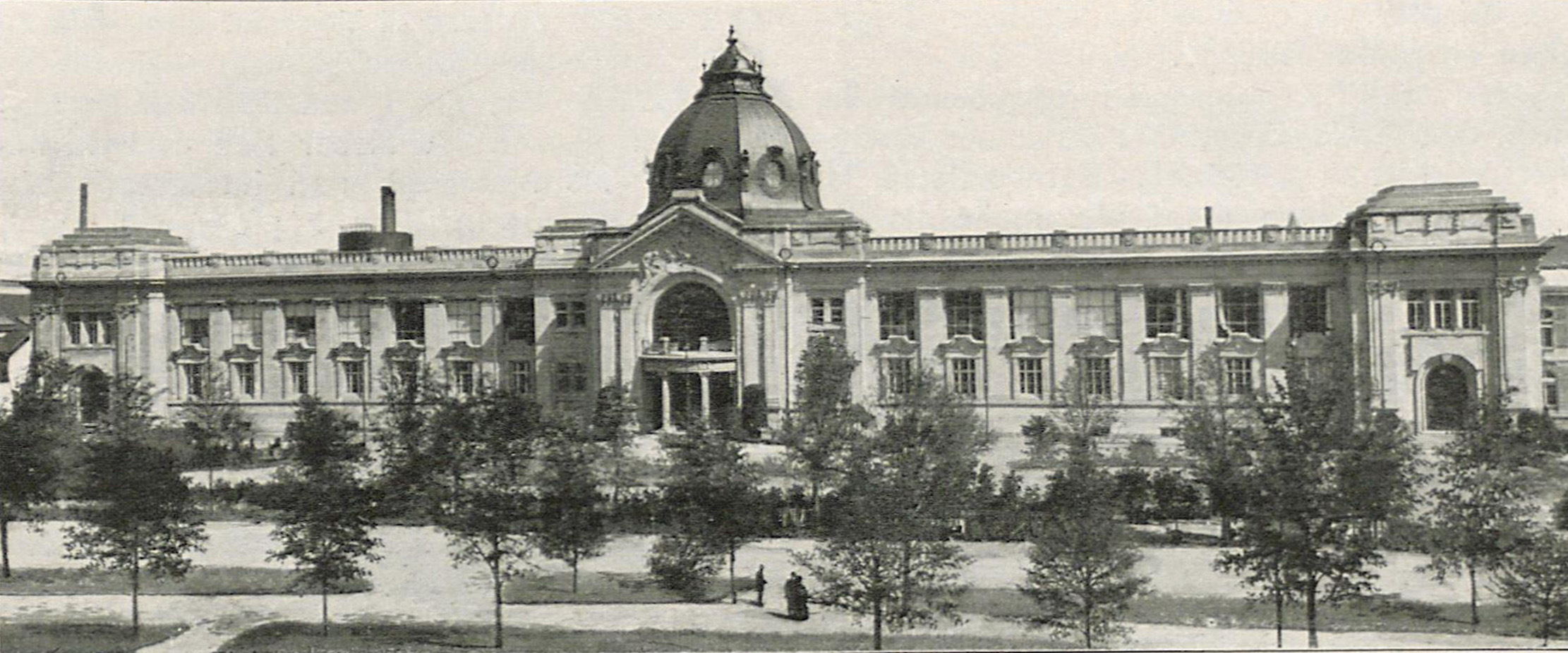 Der neue Kunstausstellungspalast zu Düsseldorf, 1902